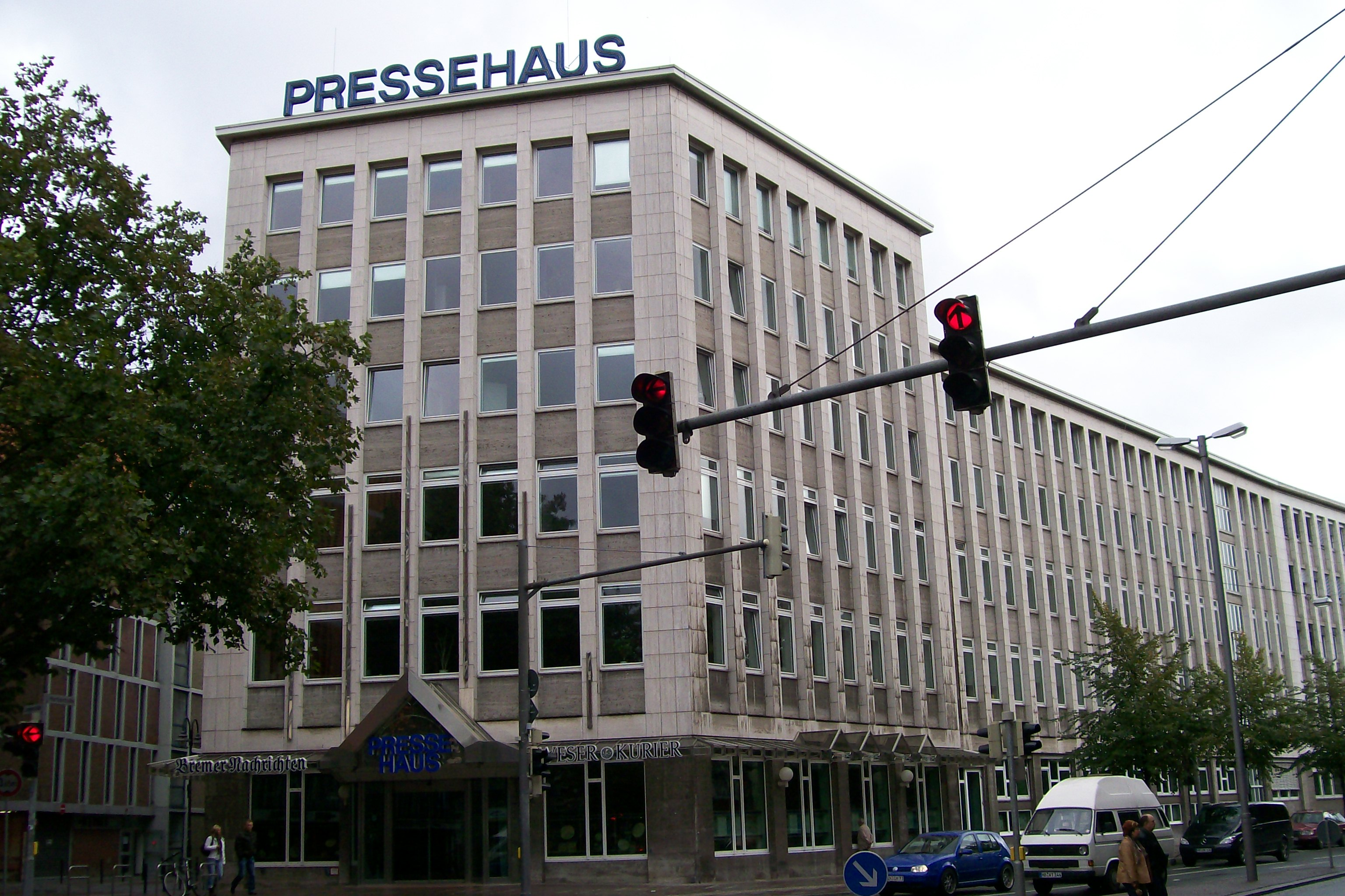 Das Pressehaus in Bremen ist Sitz der Zeitungen Bremer Nachrichten und Weser-Kurier